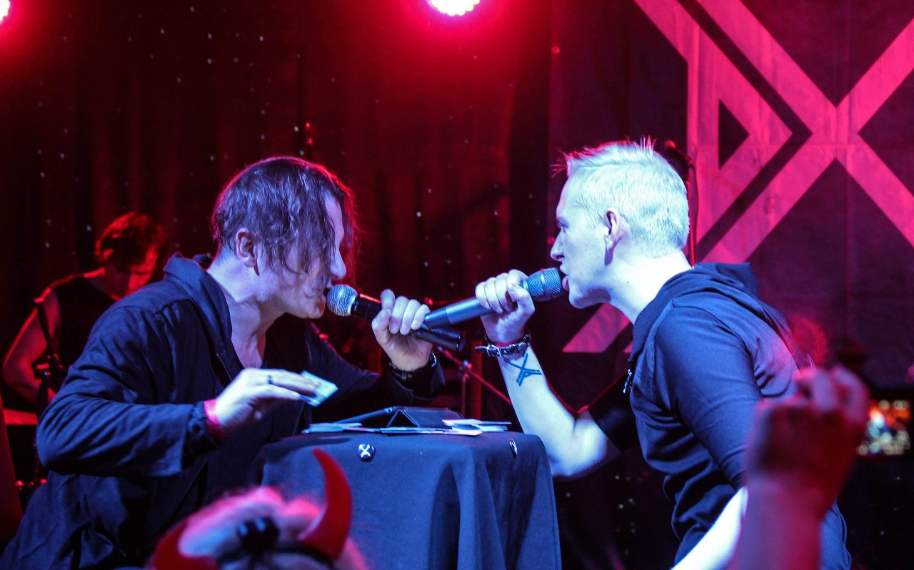 Тим Эрна и Вадим Самойлов, 2016